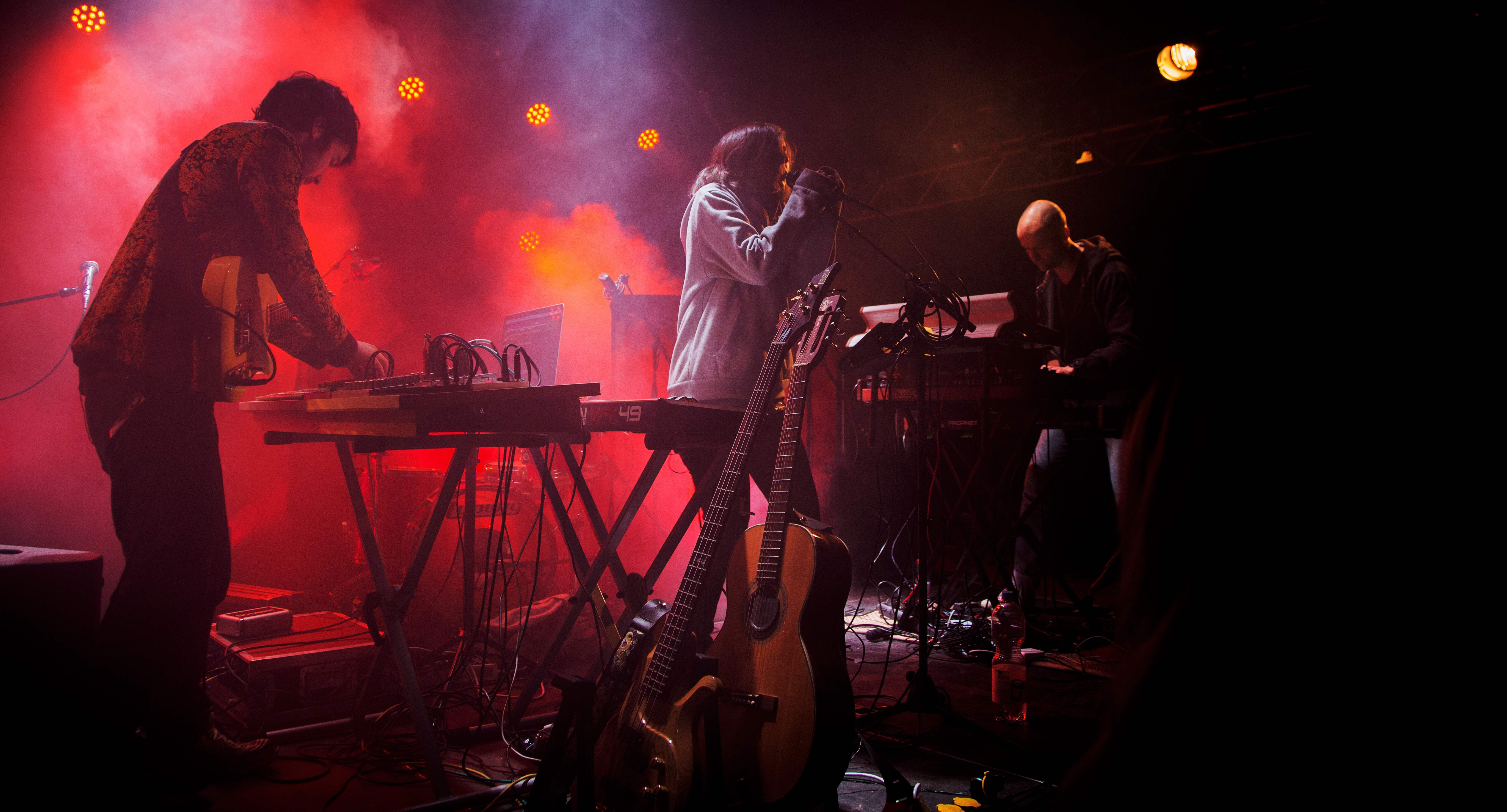 Photo by Aline Kurt